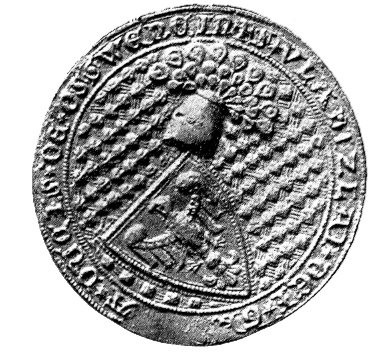 Władysław I Oświęcimski seal